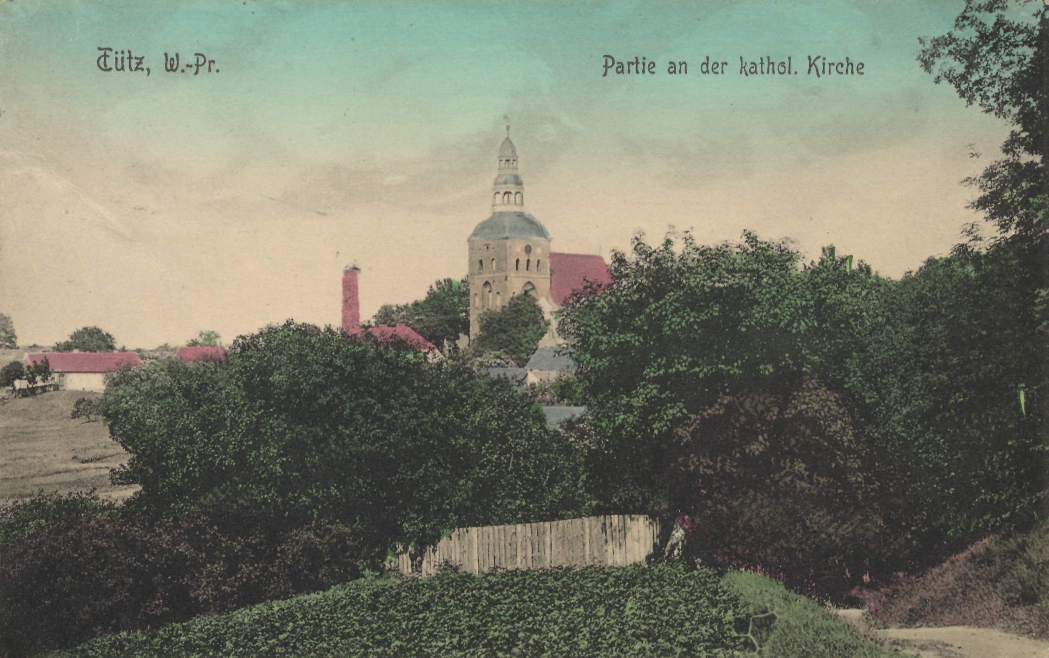 Tütz, W.-Pr., kath. Kirche